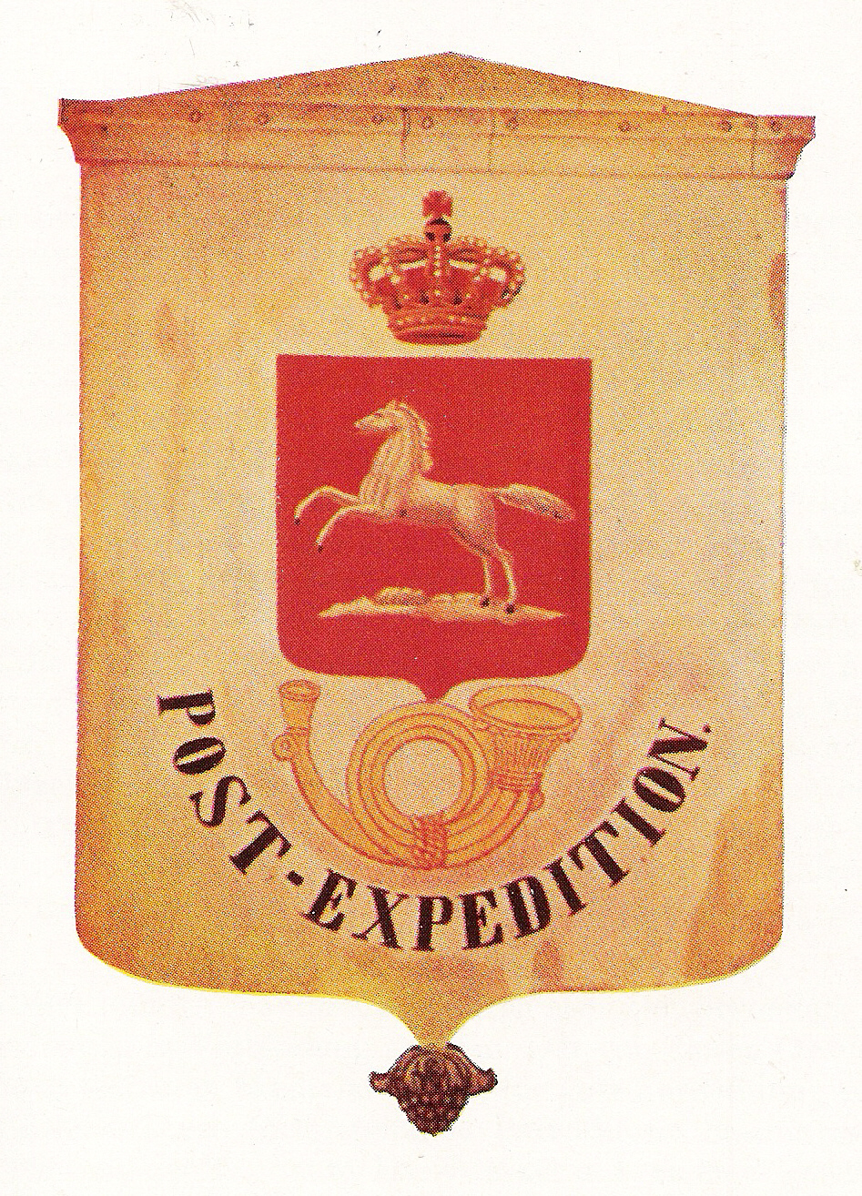 Das Schild einer Braunschweig-Lüneburgischen Post-Expedition